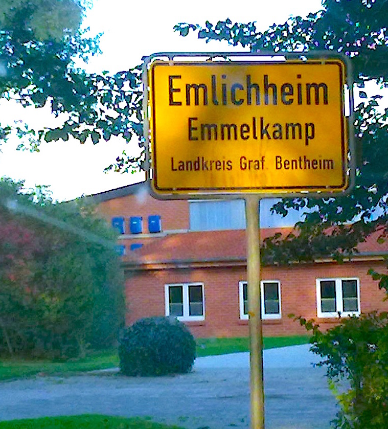 Deutsch/niederdeutsches Ortsschild in Emlichheim (niederdeutsch Emmelkamp)